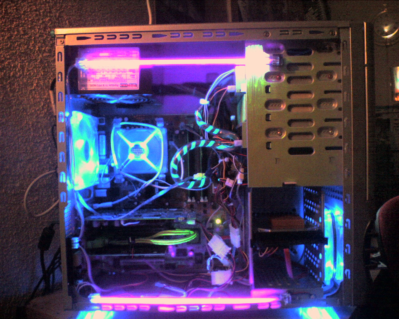 Une photo d ' un ordinateur pré-tuné avec sur l'image les 2 néons Ultra-violet